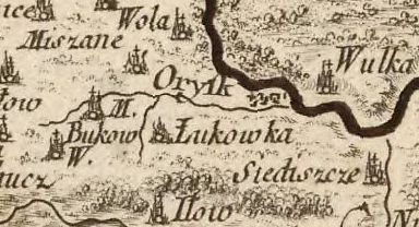 Pagus Uhrusk, Polonia, 1772